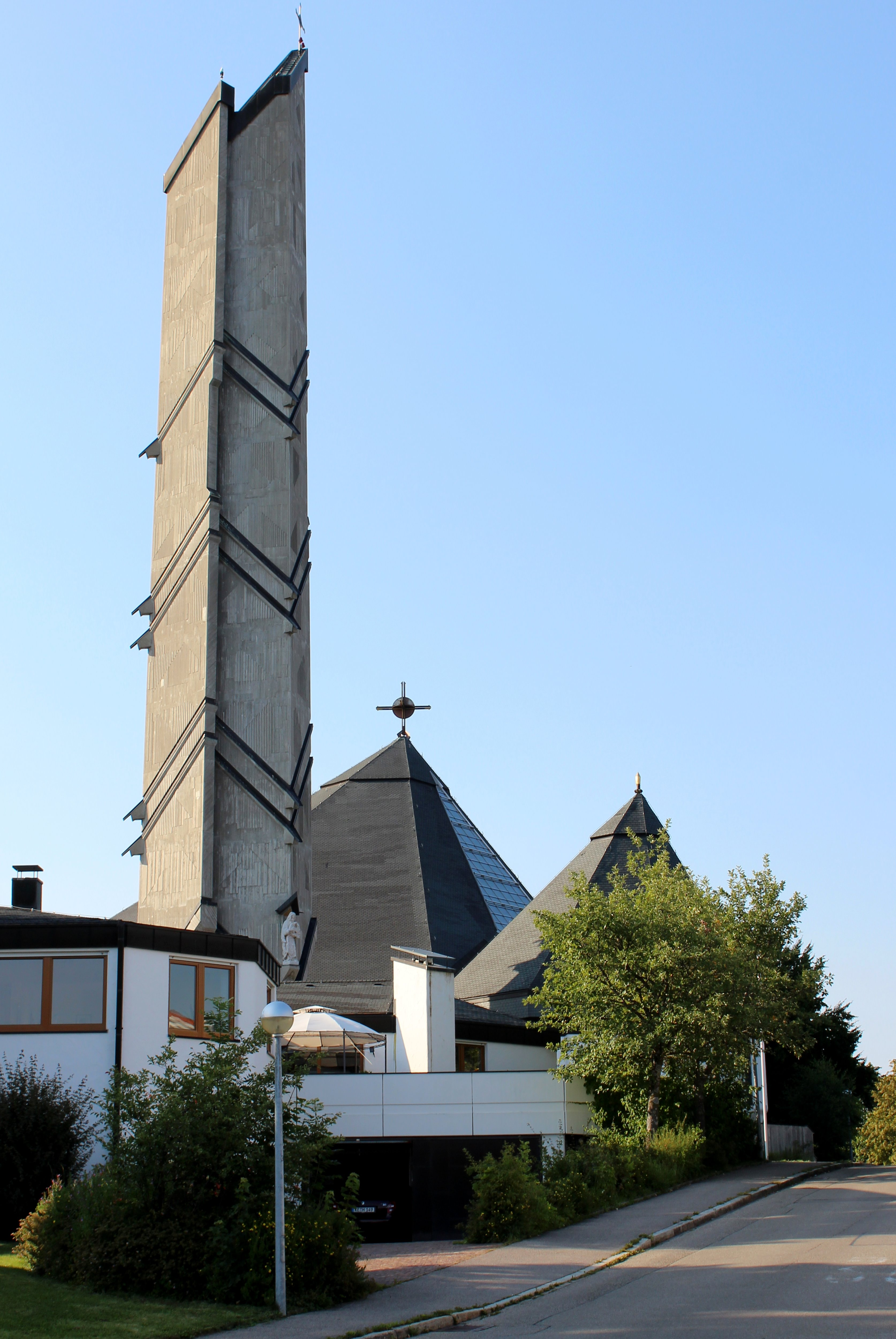 Vollansicht auf die Kirche St. Hedwig in Kempten